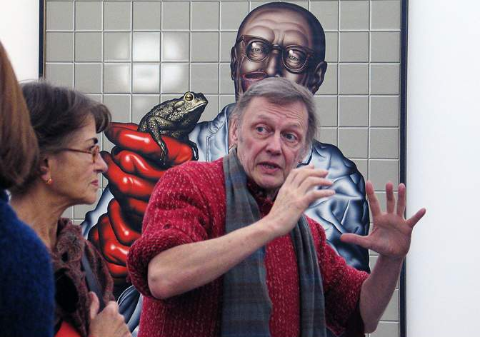 Dieter Asmus vor seinem Bild „Froschtest (Dr. Rock)“ während einer Führung durch die Ausstellung in der Stadtgalerie Kiel.